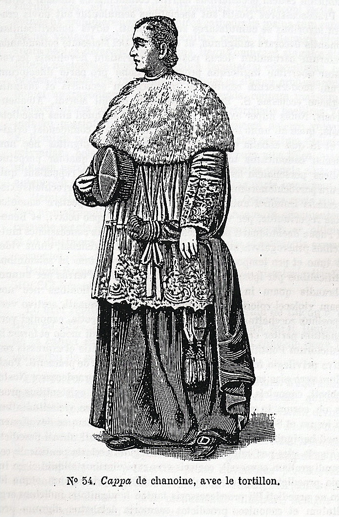 Cappa magna de chanoine. Gravure extraite de : Le costumes et les usages ecclésiastiques selon la tradition romaine, par Xavier Barbier de Montault, Paris vers 1880